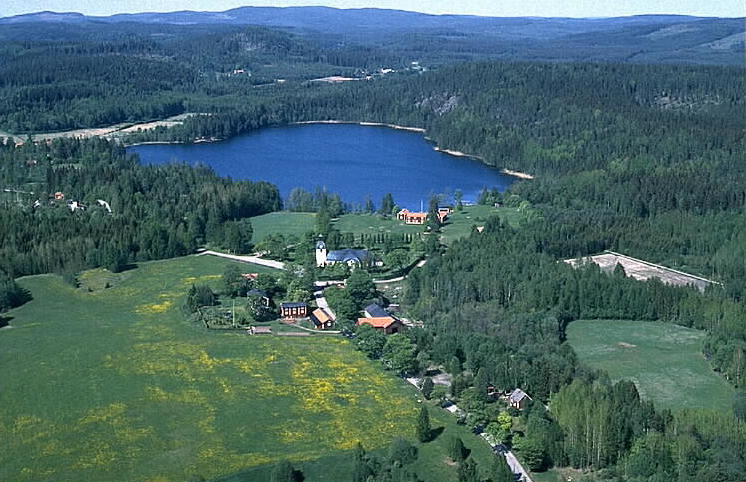 Järnboås kyrka i bildens mitt. Motiv: Järnboås Nyckelord: Flygbilder, Riksintressen Kategori: SkogslandskapJärnboås kyrka i bildens mitt.